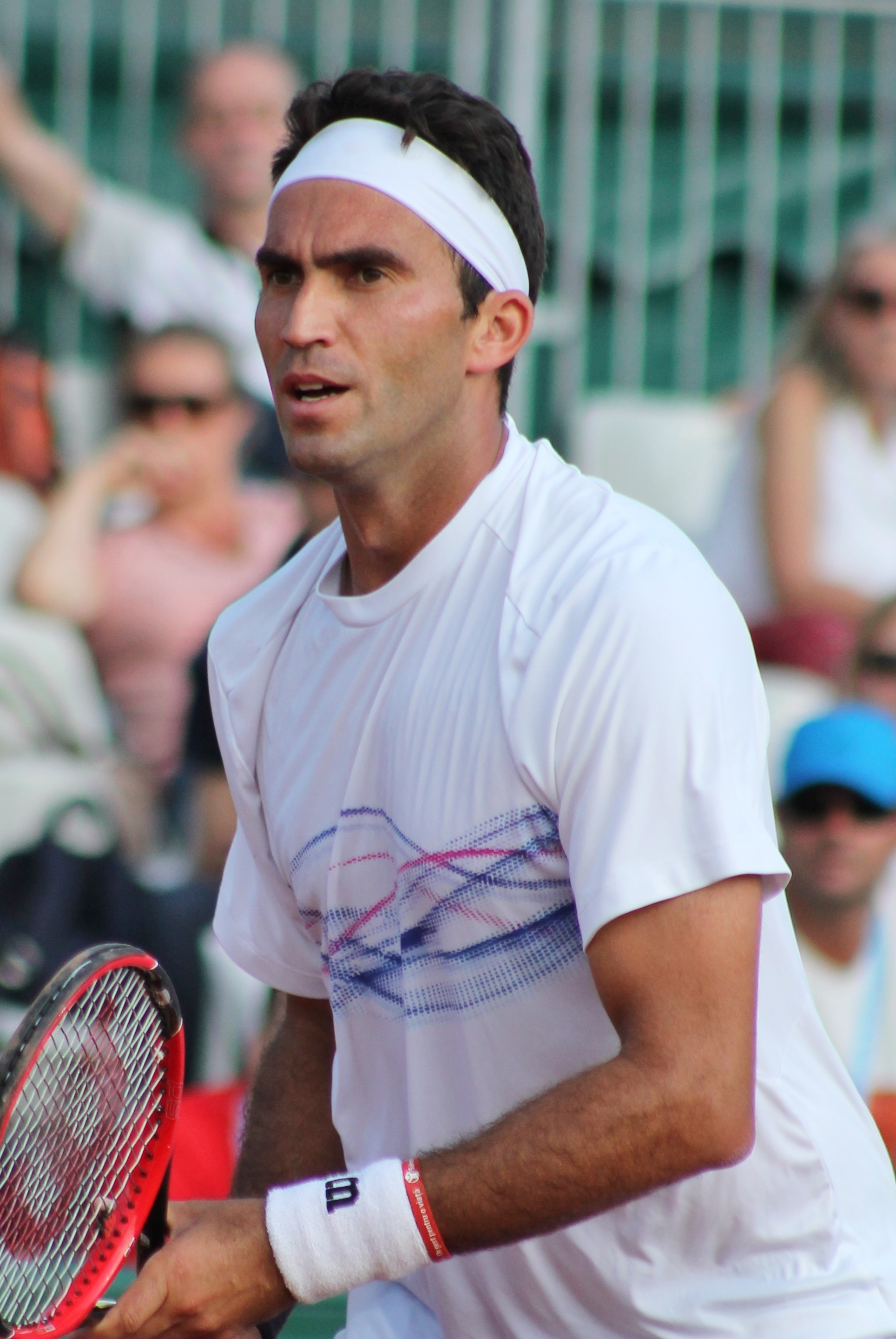 Tecau RG16 (1)